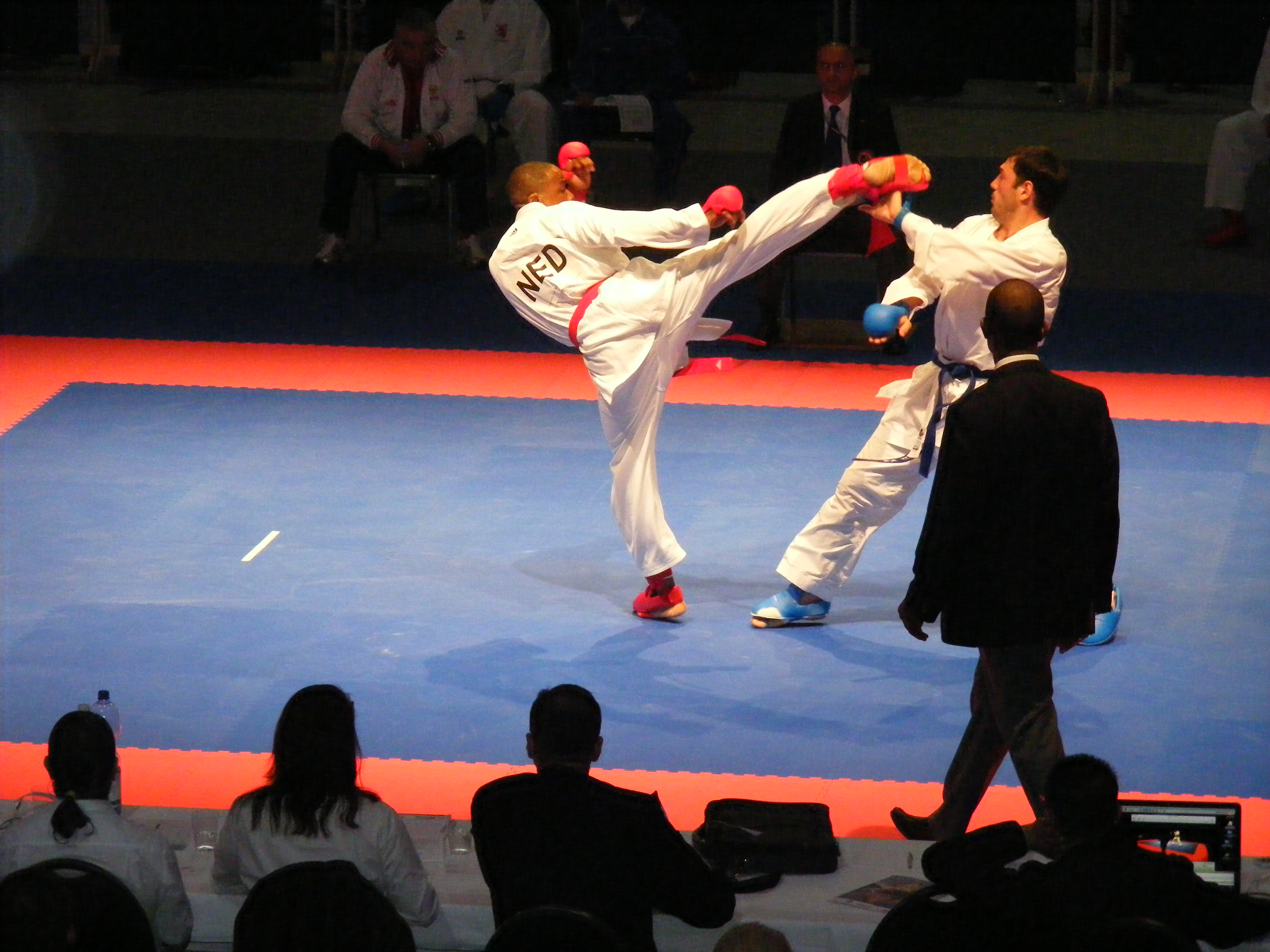 Mawashi Geri geht am Kopf vorbei Karate EM 2011